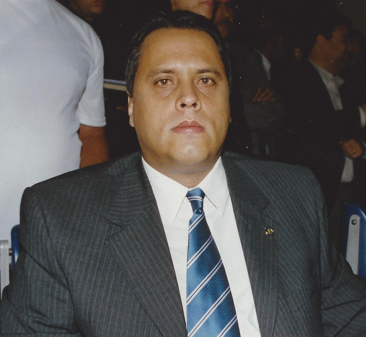 Posse dos deputados estaduais da Paraíba, na Assembléia Legislativa da Paraíba, em 2003.